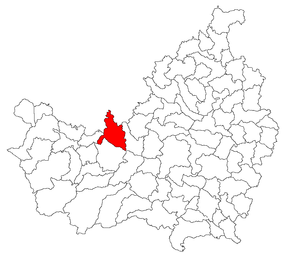 Categorie:Hărţi ale judeţului Cluj